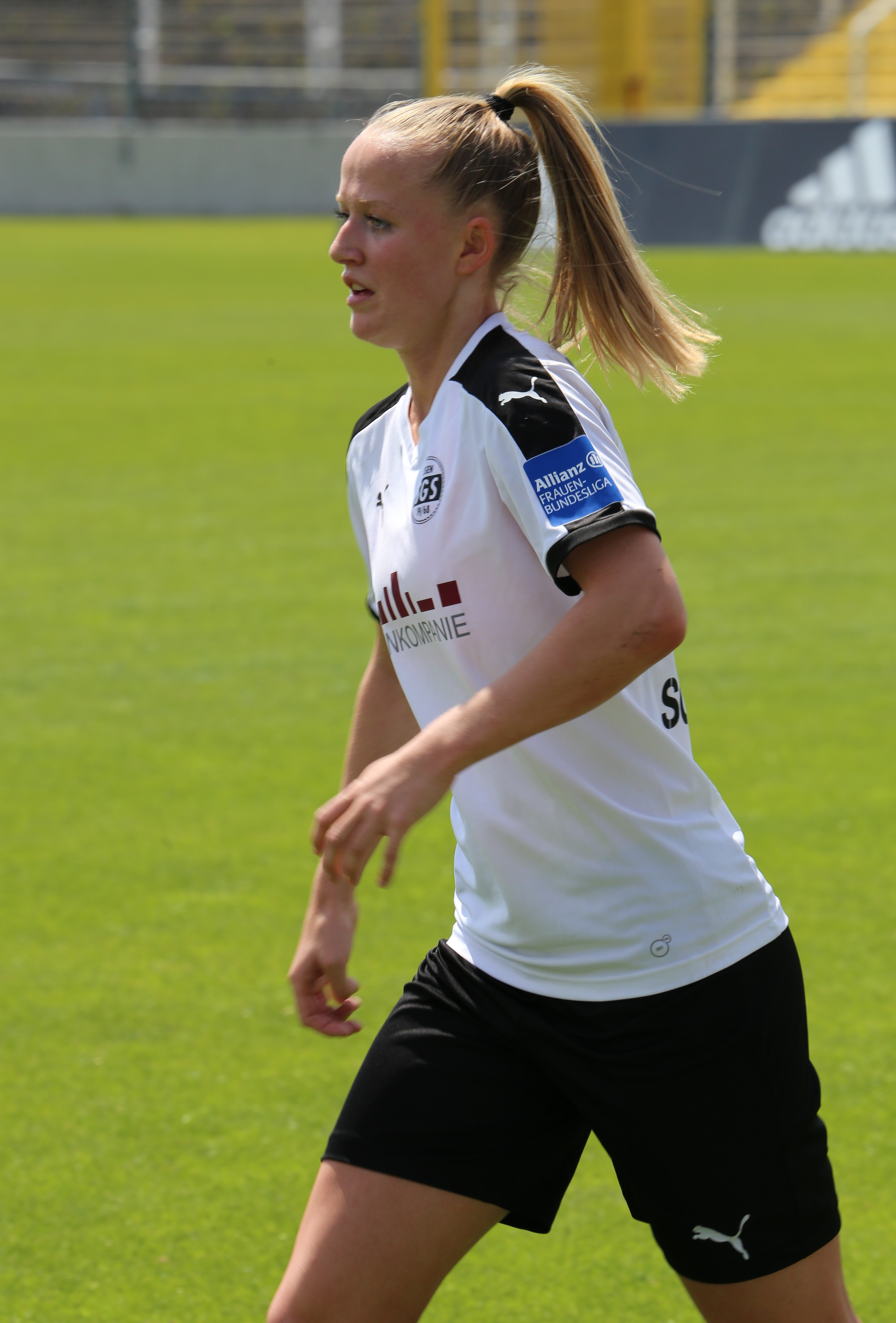 Lea Schüller (SGS Essen) beim Frauen-Bundesliga-Spiel FC Bayern München gegen SGS Essen am 21. Mai 2017 im Stadion an der Grünwalder Straße (Ergebnis war 2:0)